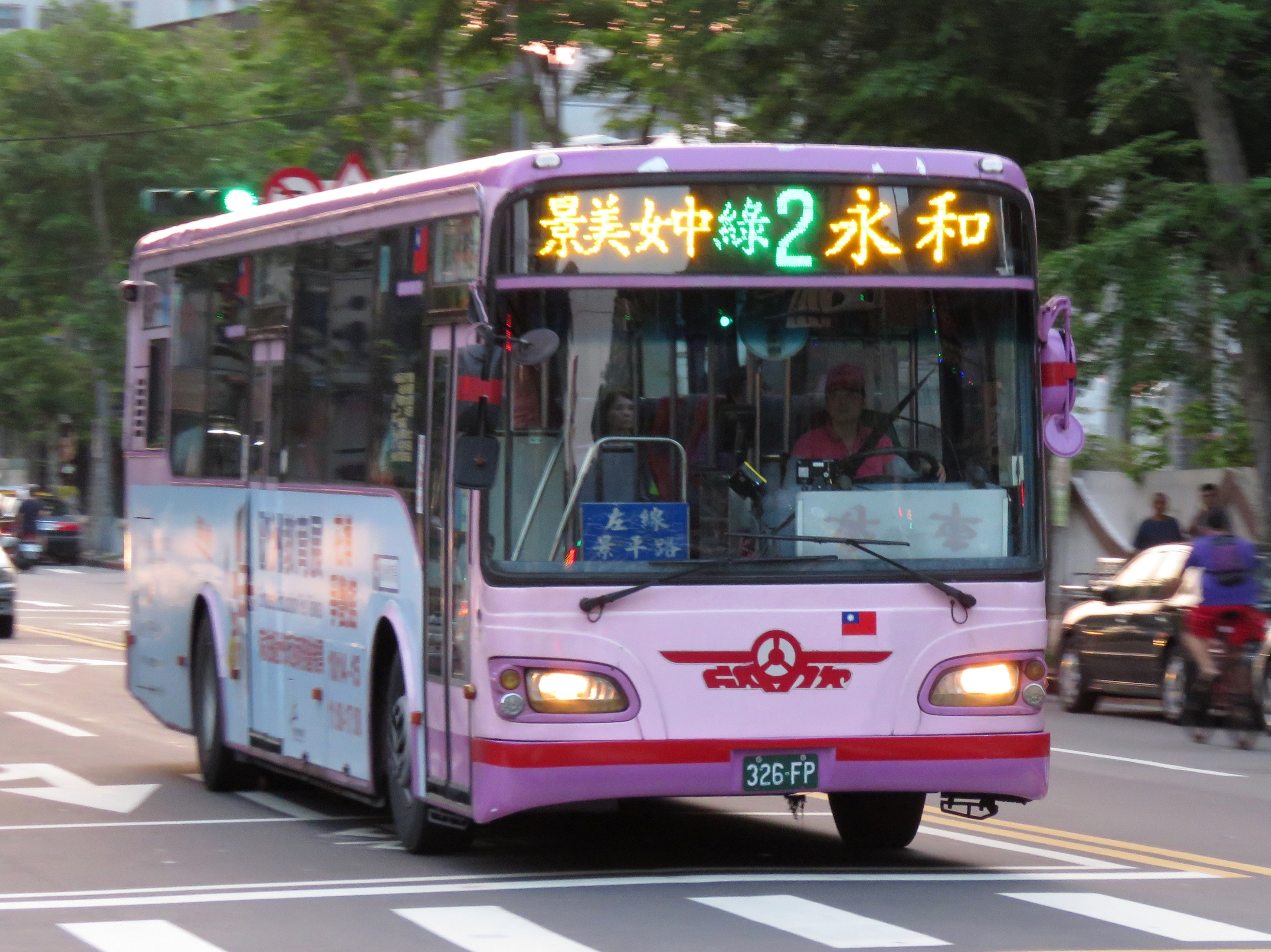 中文（台灣）: 新北市區公車綠2(左線)路線